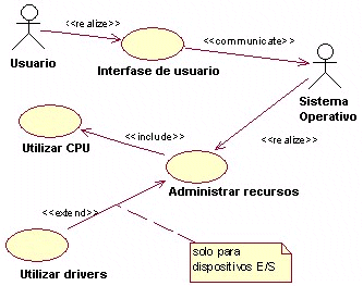 Funciones del Sistema Operativo